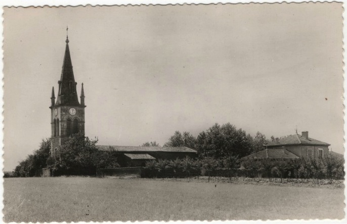 Cheyssieu (Isère). L'église. Carte postale ancienne.